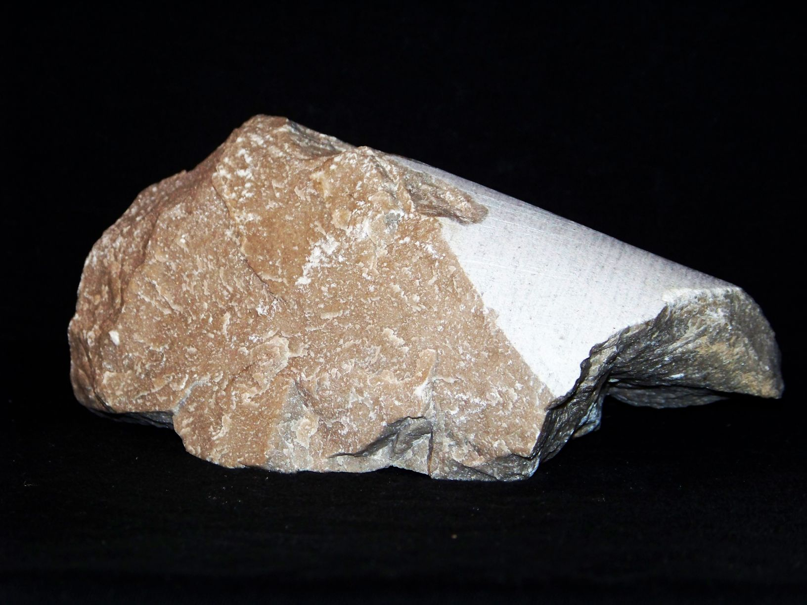 Fragment rdzenia wiertniczego, wapien kalkarenitowy, gł. ok 1200 m. Karbon dolny - wizen. otwór Mrowla 1, okolice Rzeszowa, woj. Podkarpackie, Polska.